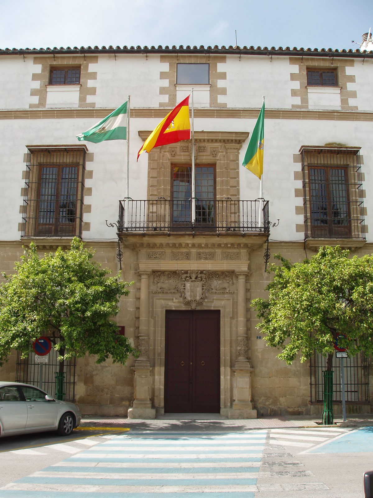 Ayuntamiento de El Puerto de Santa María